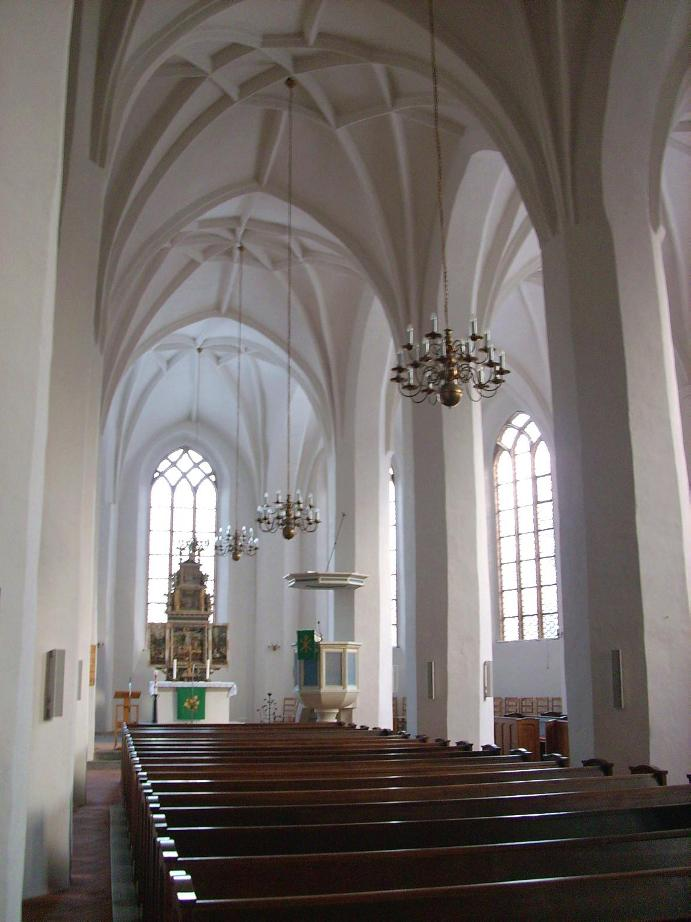 Kirchenschiff der Johanneskirche in Hoyerswerda